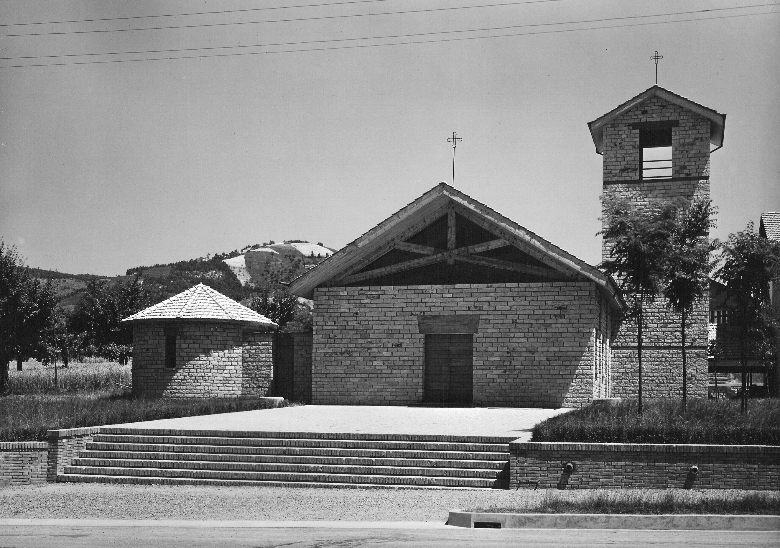 La chiesa parrocchiale sorge in una località dell’Appennino reggiano sulla strada statale n. 63 del Cerreto.